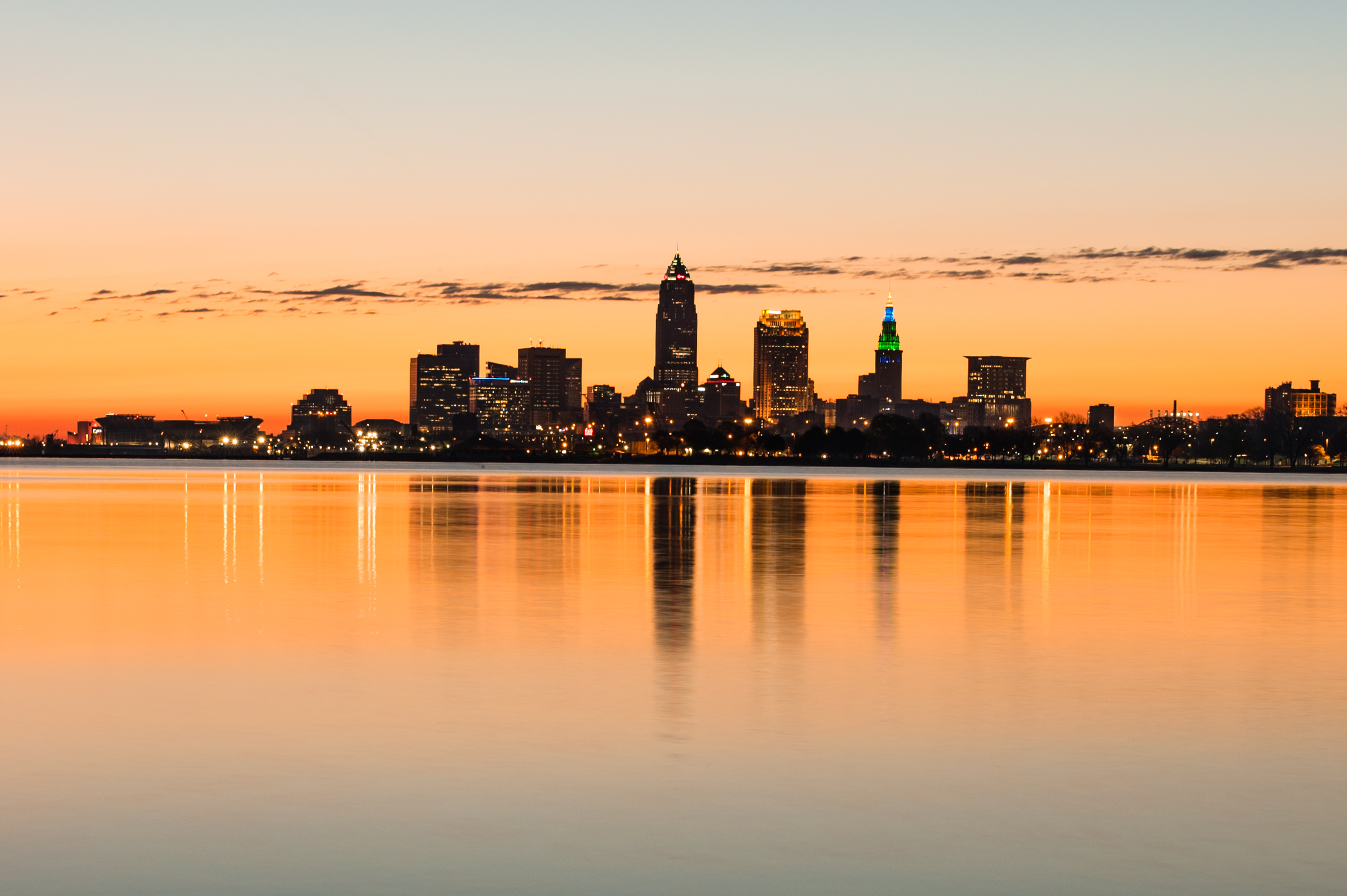 Edgewater Park Sunrise